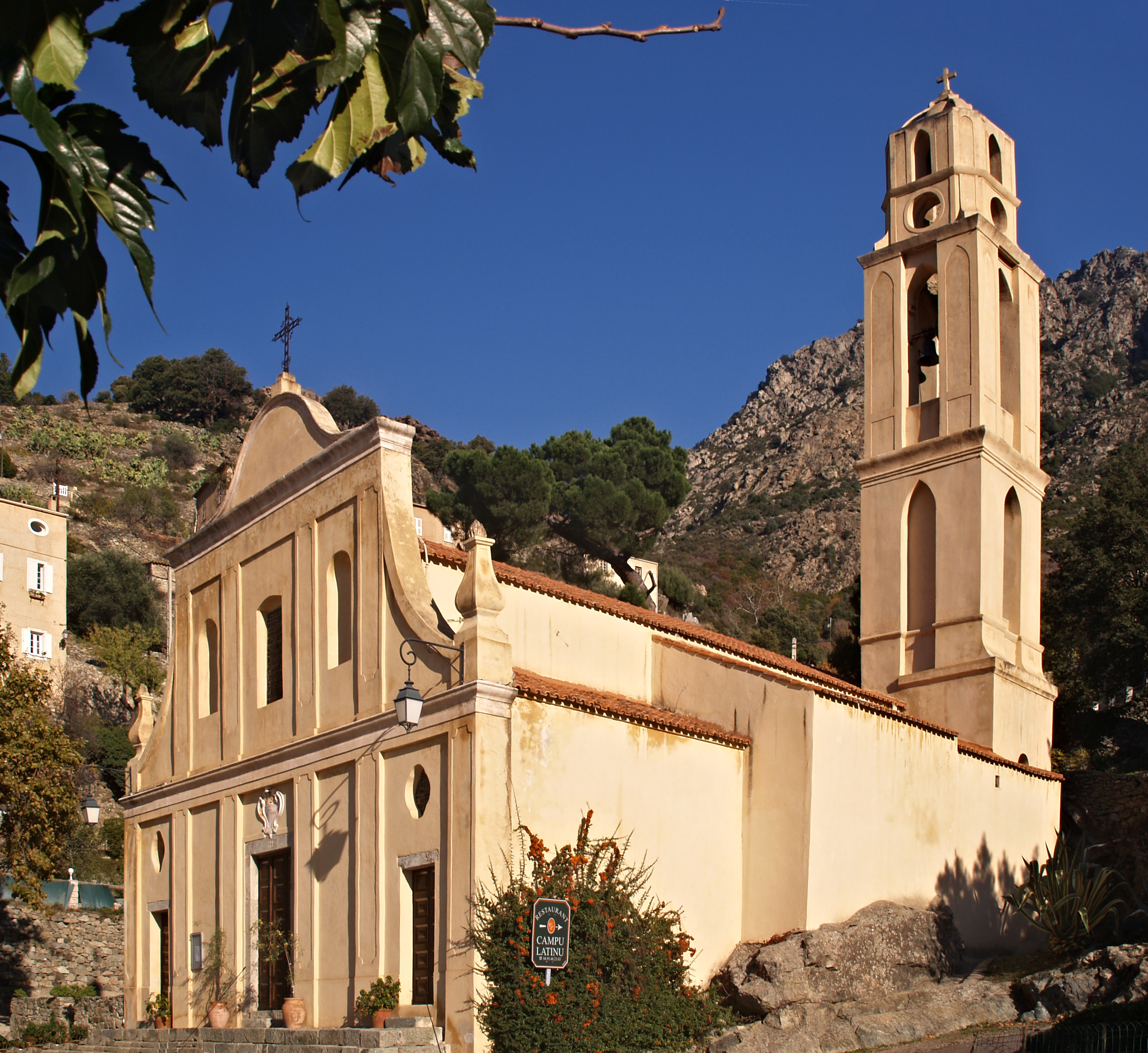 Lama, Balagne (Corse) - Église Saint-Laurent